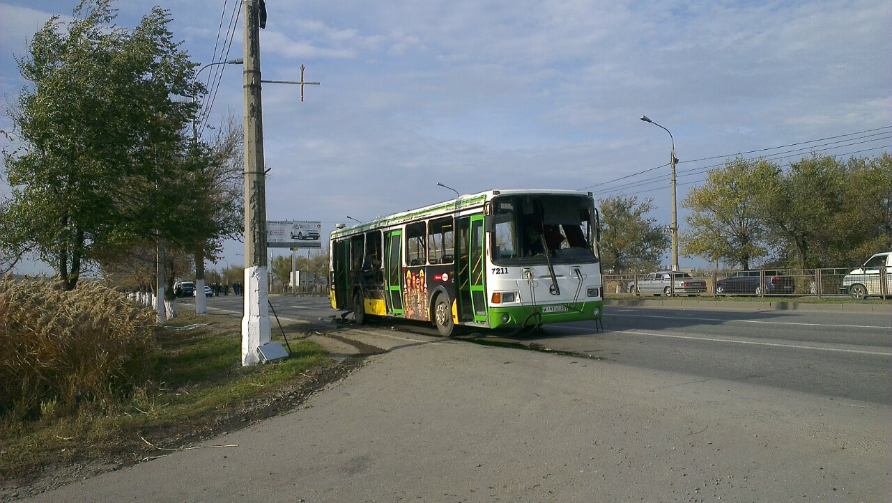 Attentat du 21 octobre 2013 à Volgograd.